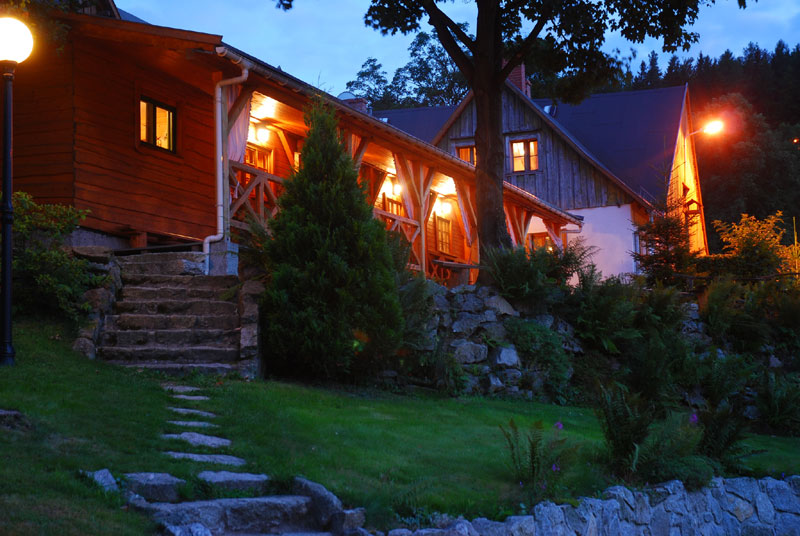 Teatr Nasz - Scena za Domem